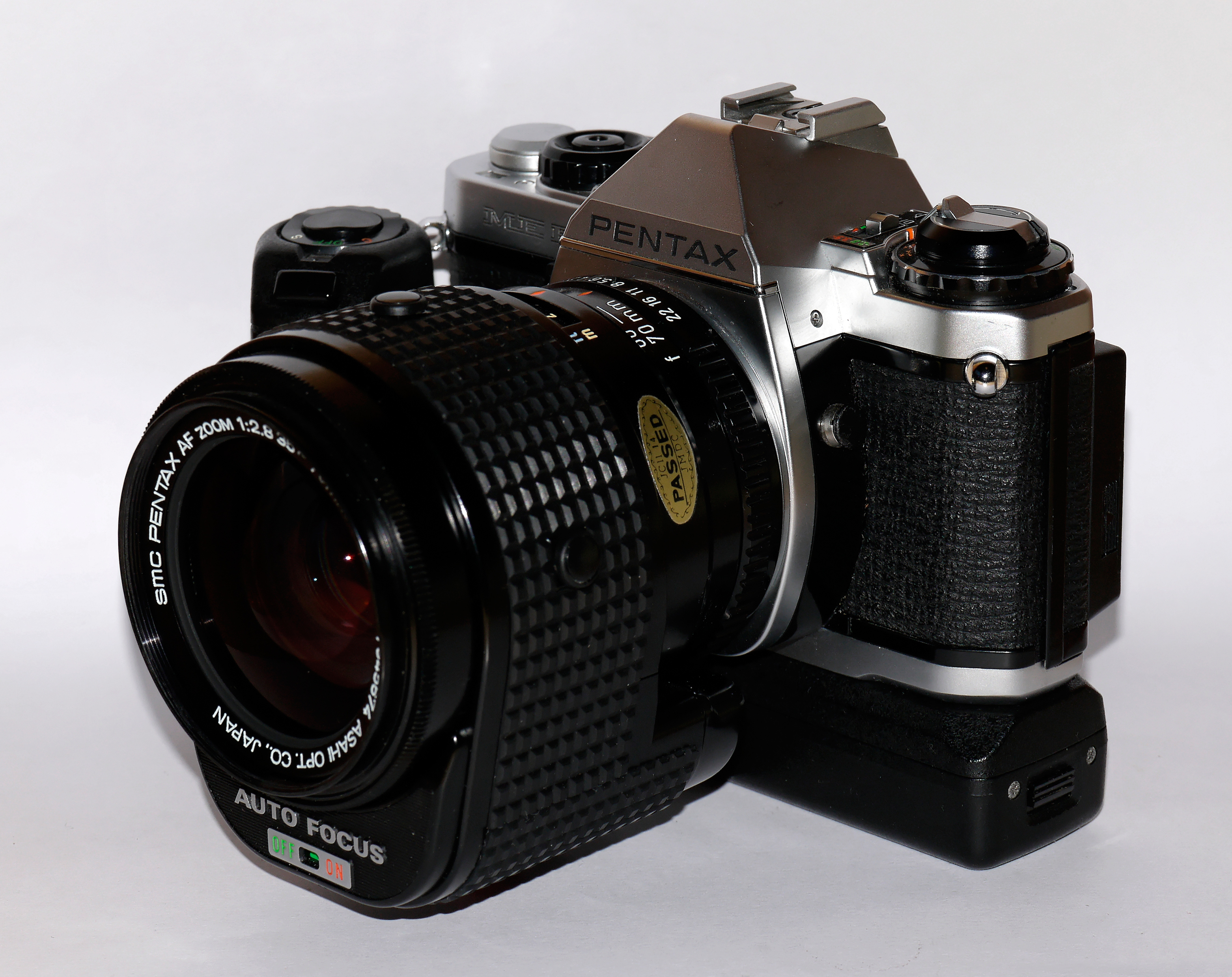 Pentax ME F mit AF 2.8/35-70mm Objektiv und Winder ME2